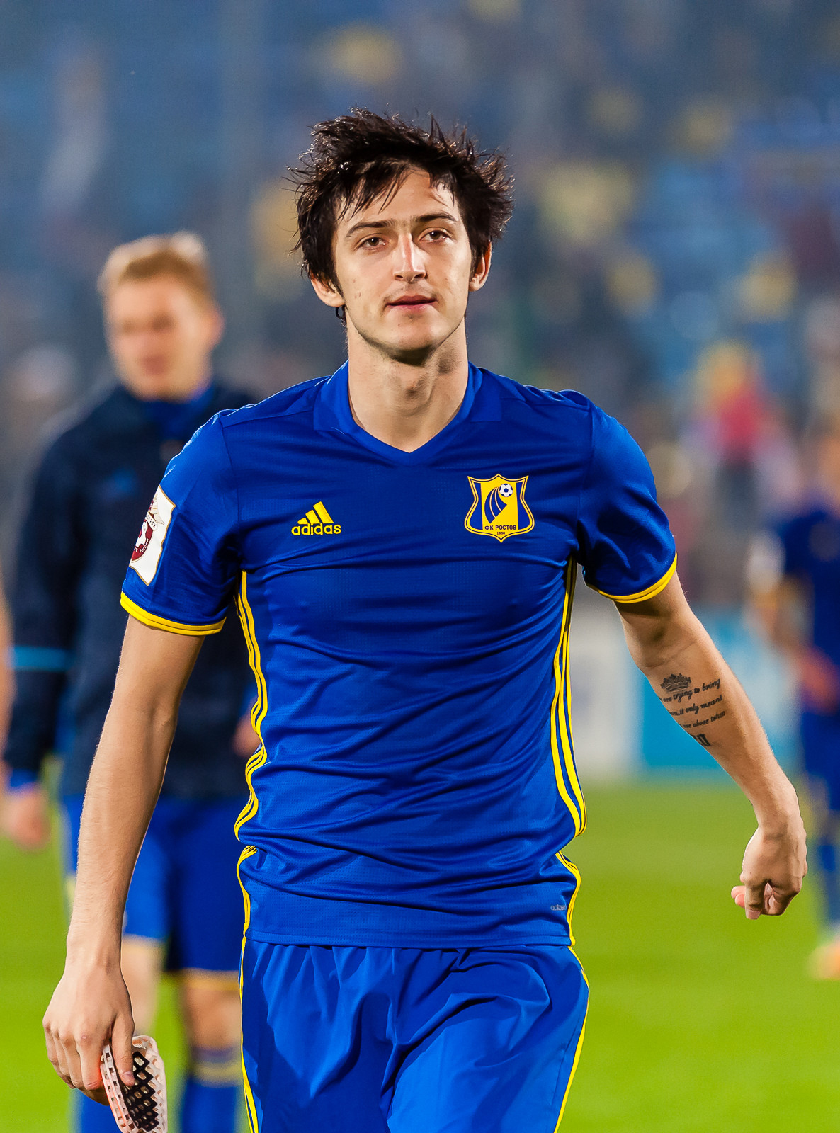 «Ростов» - «Рубин»